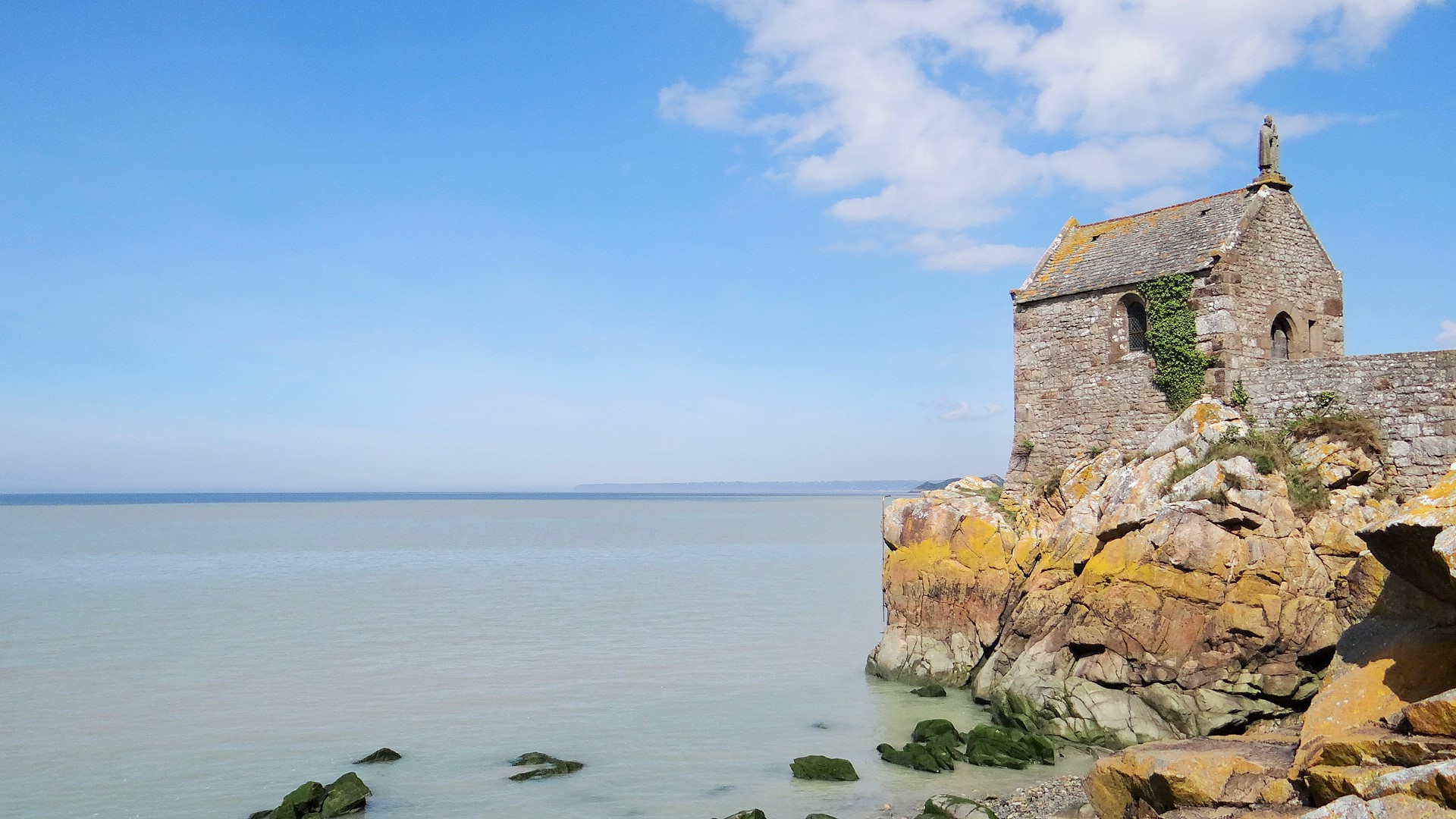 Chapelle Saint-Aubert, Mont-Saint-Michel, Manche, France